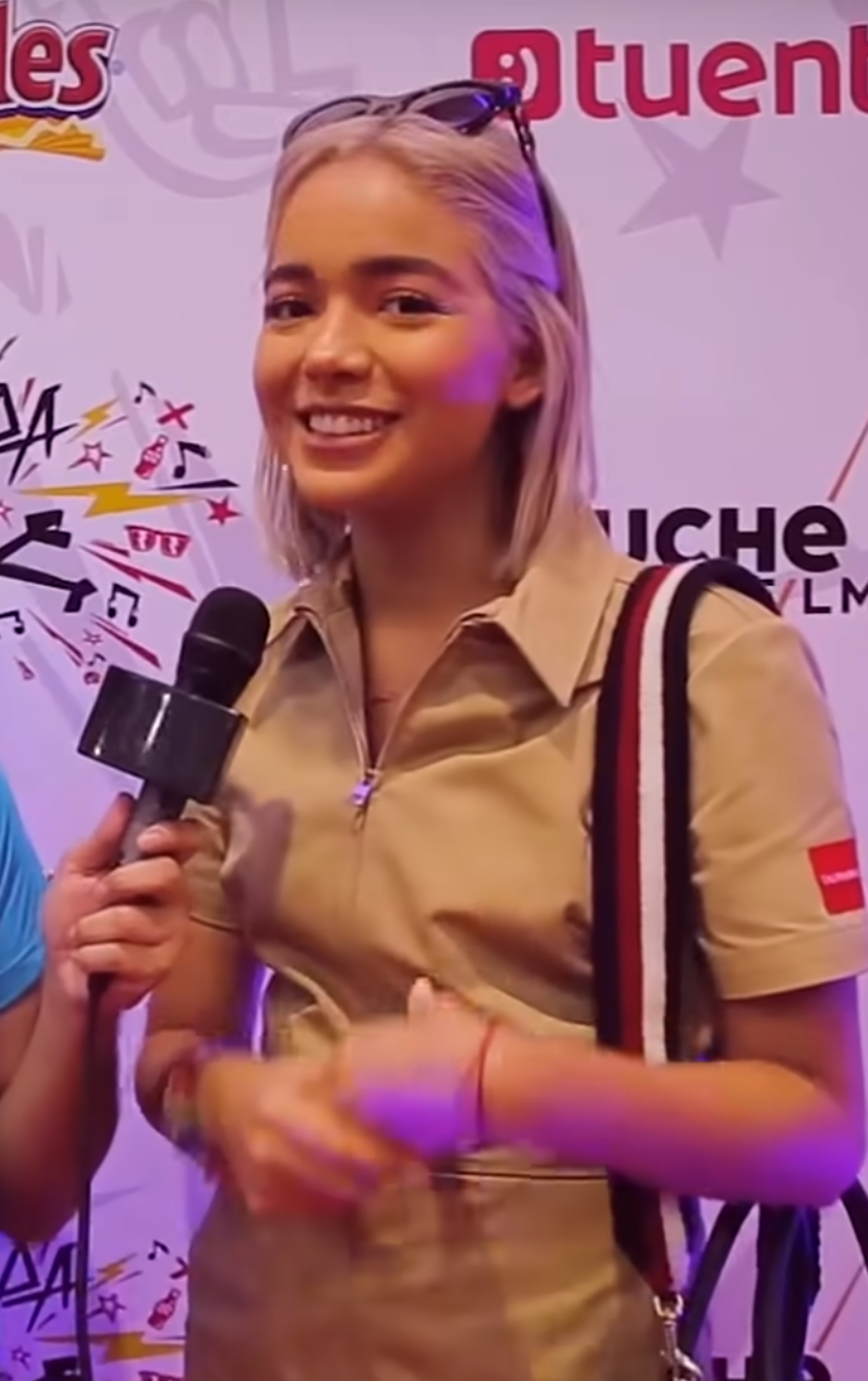 Samara Montero en 2019.